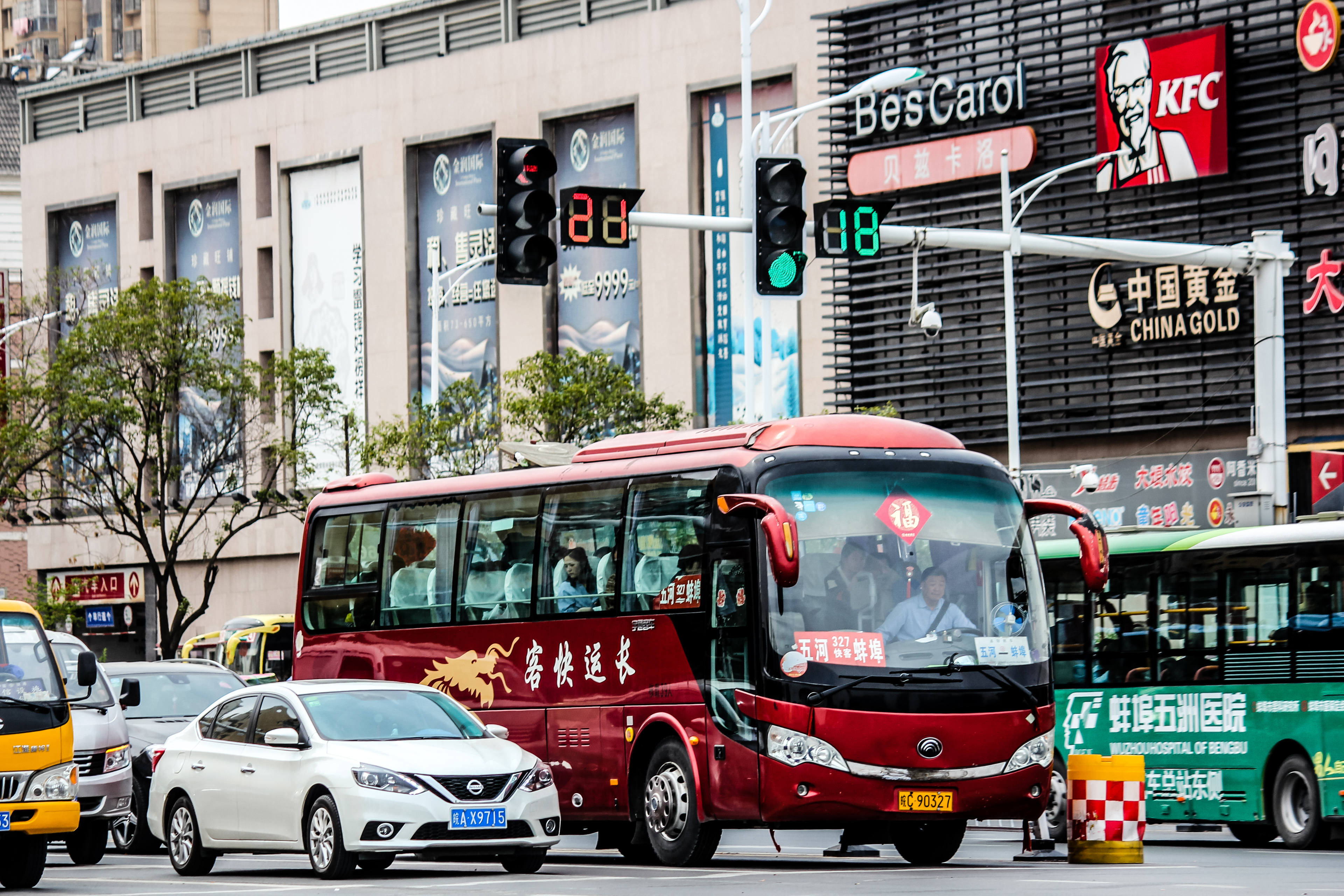 使用宇通客车的蚌埠-五河客运班线。